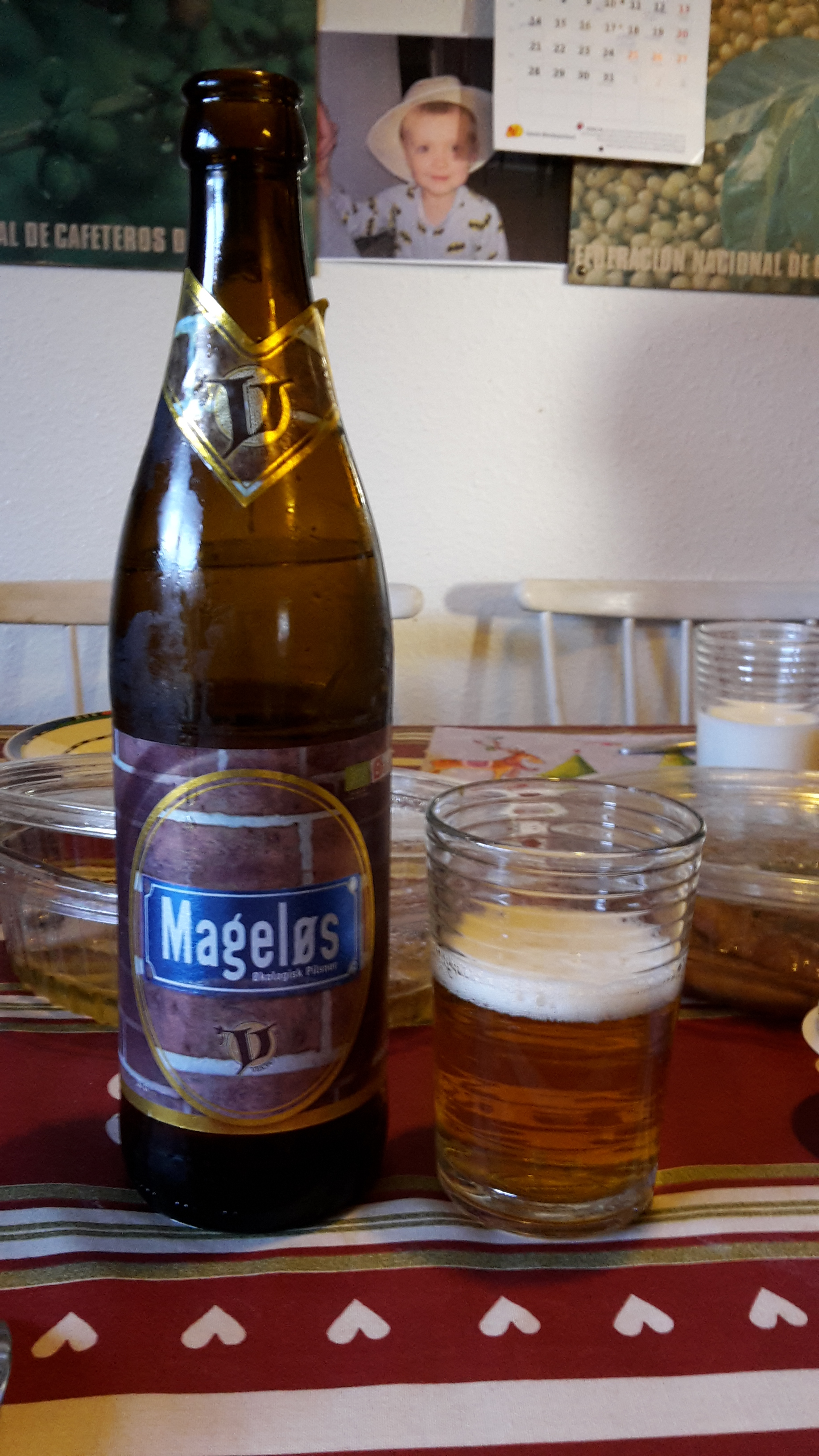 Mageløs from Viborg Bryghus